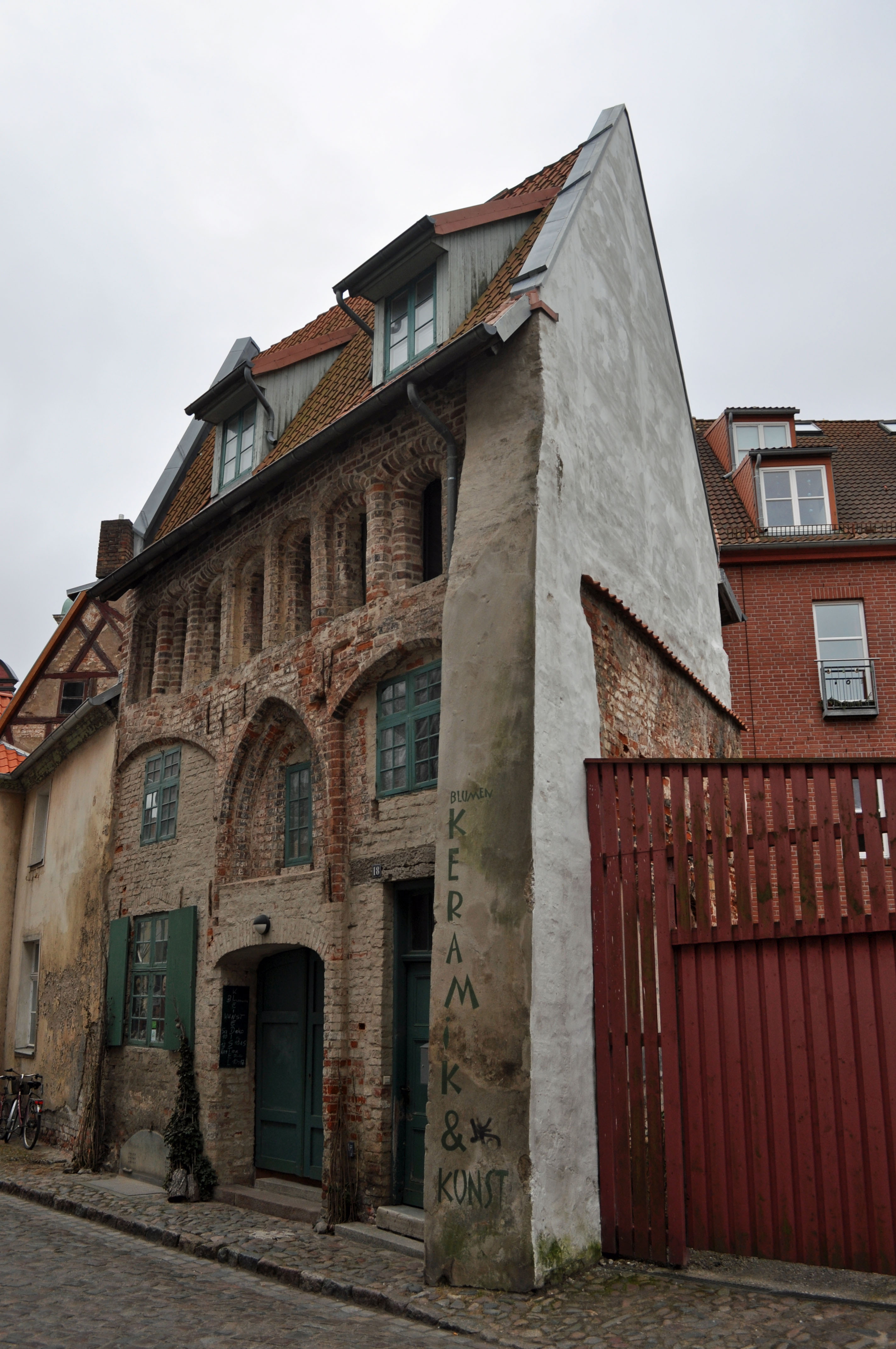 Gebäude bzw. Gebäudedetail in Stralsund. Straße und Hausnummer siehe Dateiname.